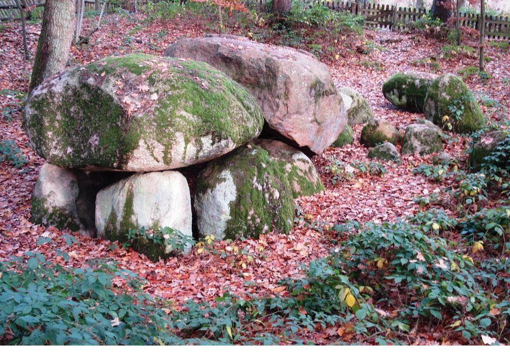 Grosssteingrab Luebeck-Blankensee